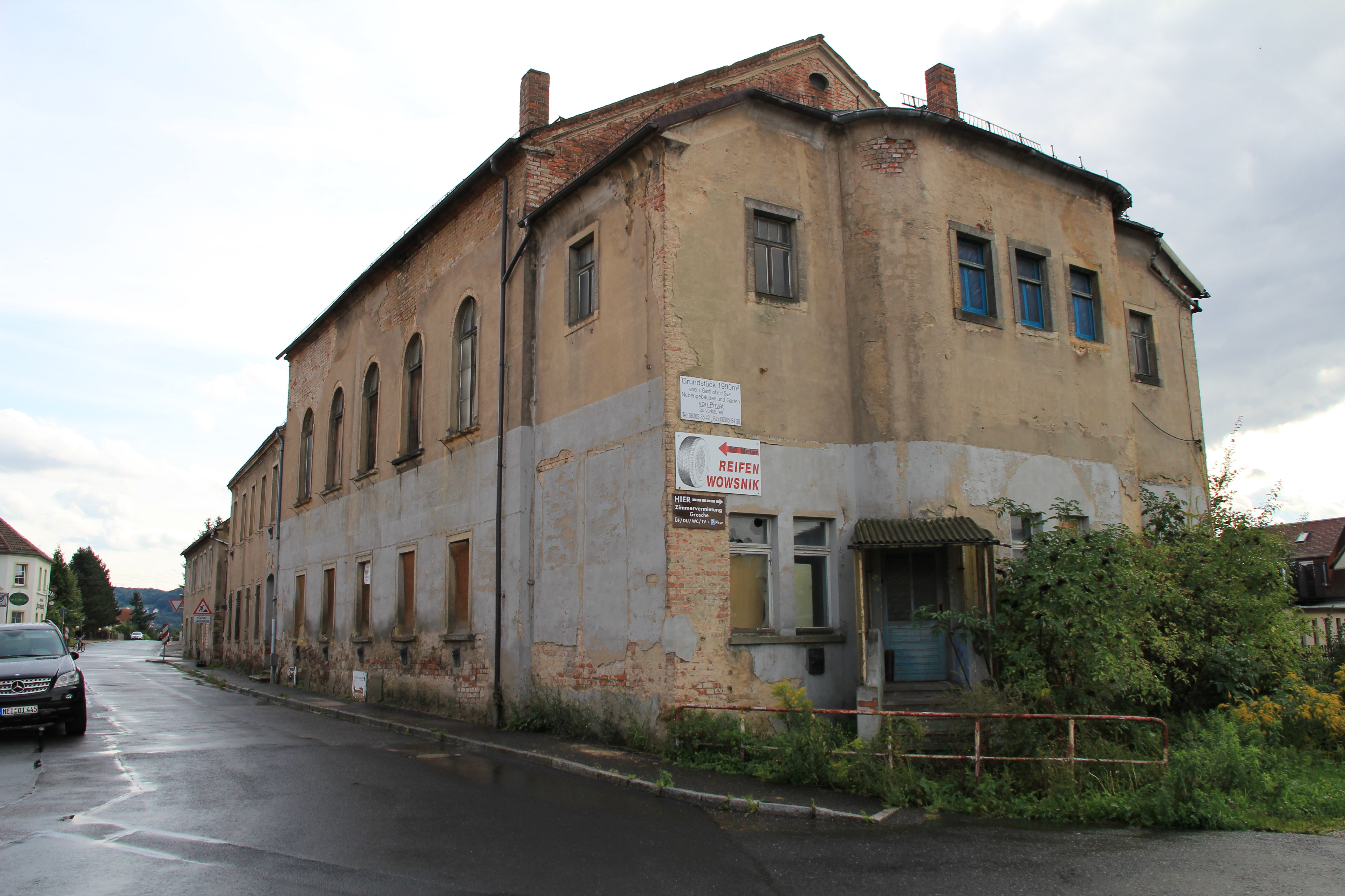 Gasthof Naundorf in Radebeul